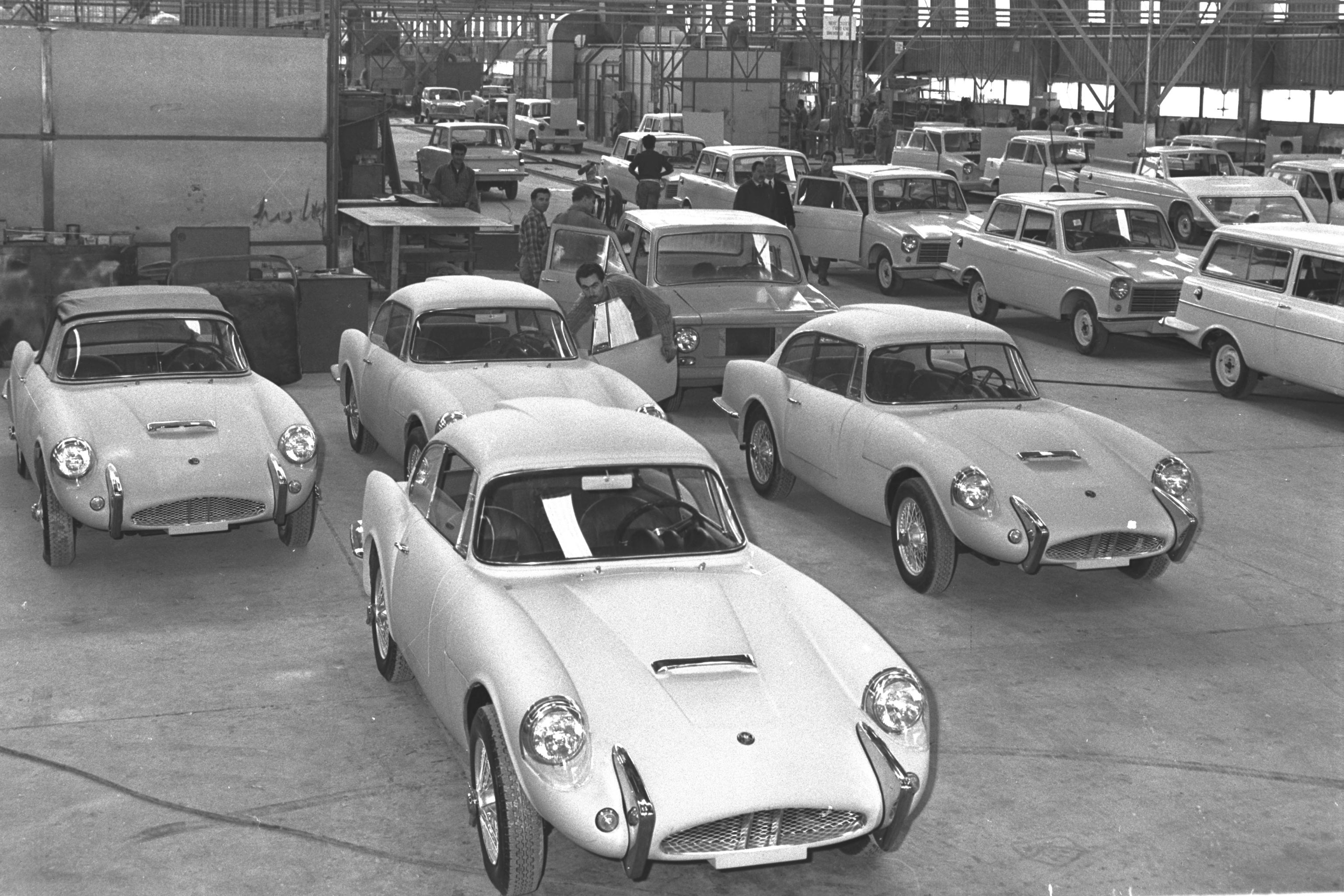 SABRA SPORTS CARS AND 'CARMEL 12' PASSENGER CARS LEAVING THE PRODUCTION LINE AT THE AUTOCARS CAR FACTORY IN TIRAT HA'CARMEL (09/03/1967). מכוניות ספורט מסוג 'סברה' ומכוניות 'כרמל 12' יורדות מפס הייצור במפעל המכוניות בטירת הכרמל